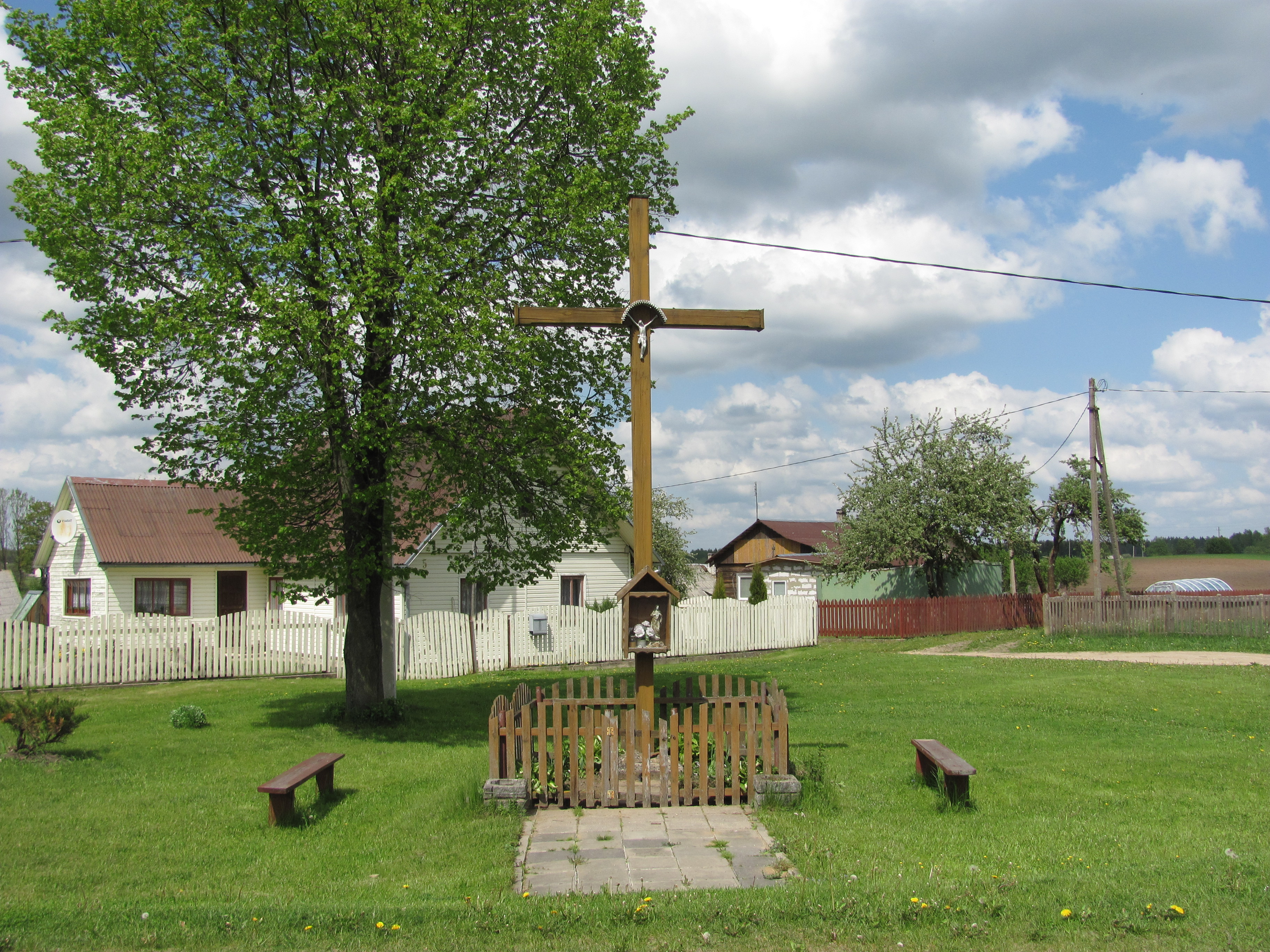 Skaisteriai, Lithuania